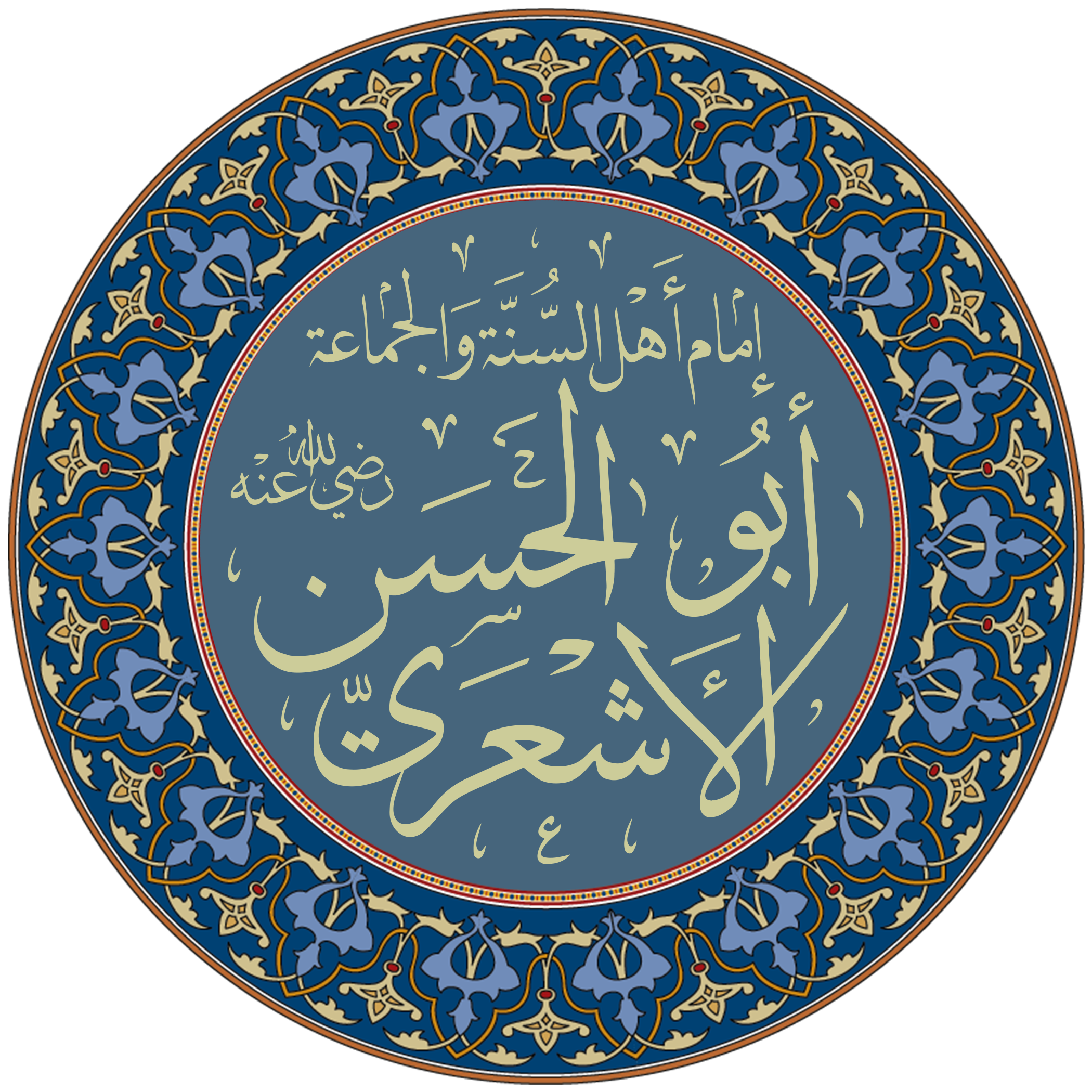 تخطيط لاسم العالم المسلم أبي الحسن الأشعري